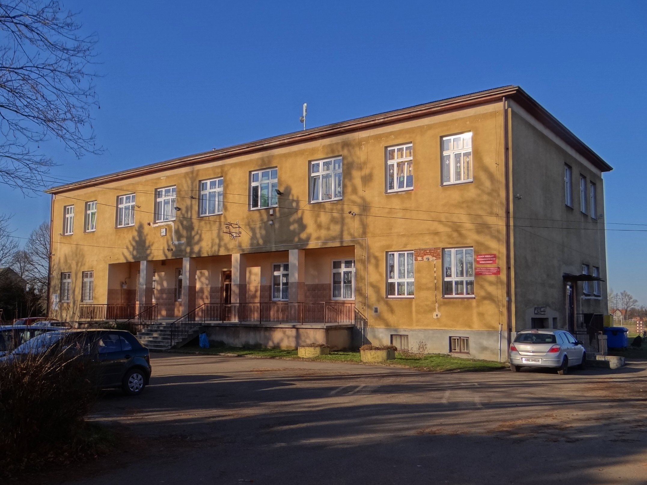 Szkoła Podstawowa w Książnicach